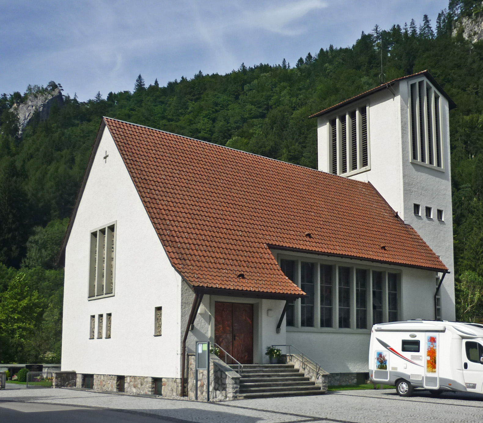 Pfarrkirche hl. Johannes Nepomuk in Lorüns